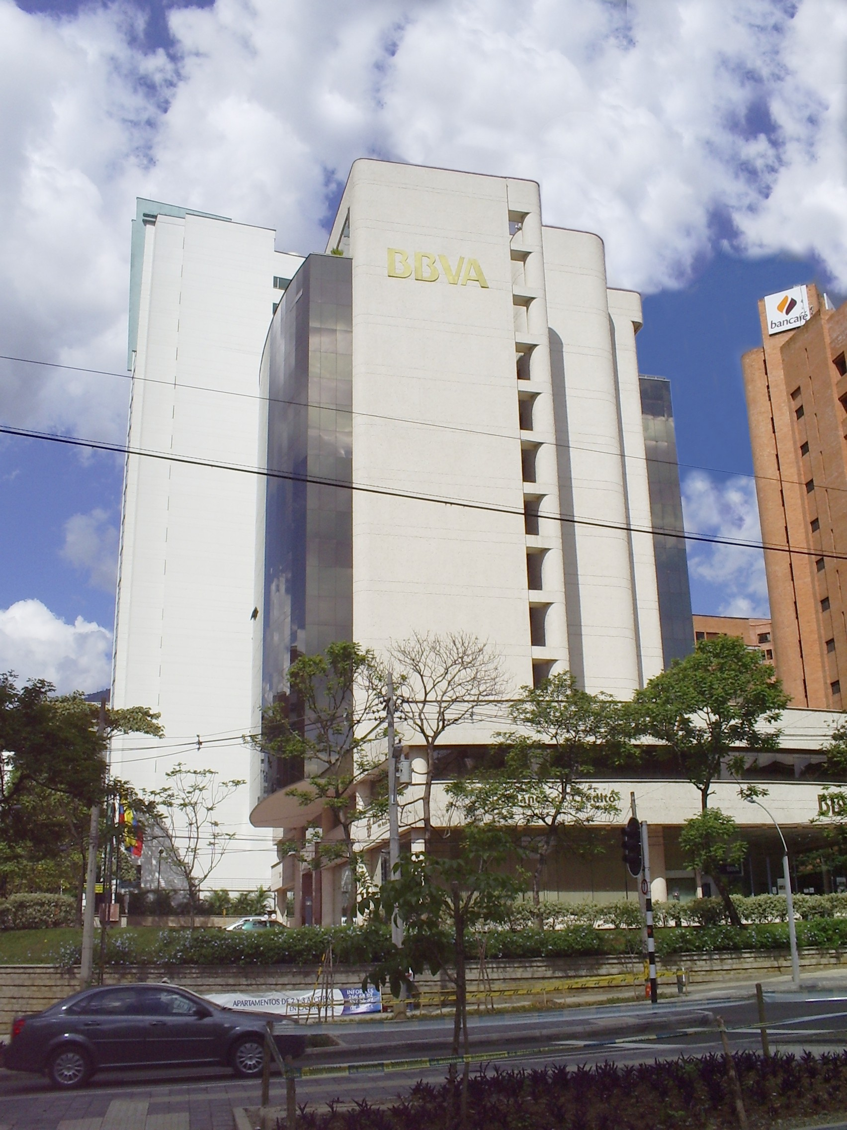 Banco BBVA, Avenida Poblado, Medellín, Colombia